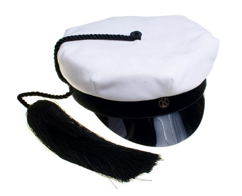 Lappeenrantalainen teekkarilakki